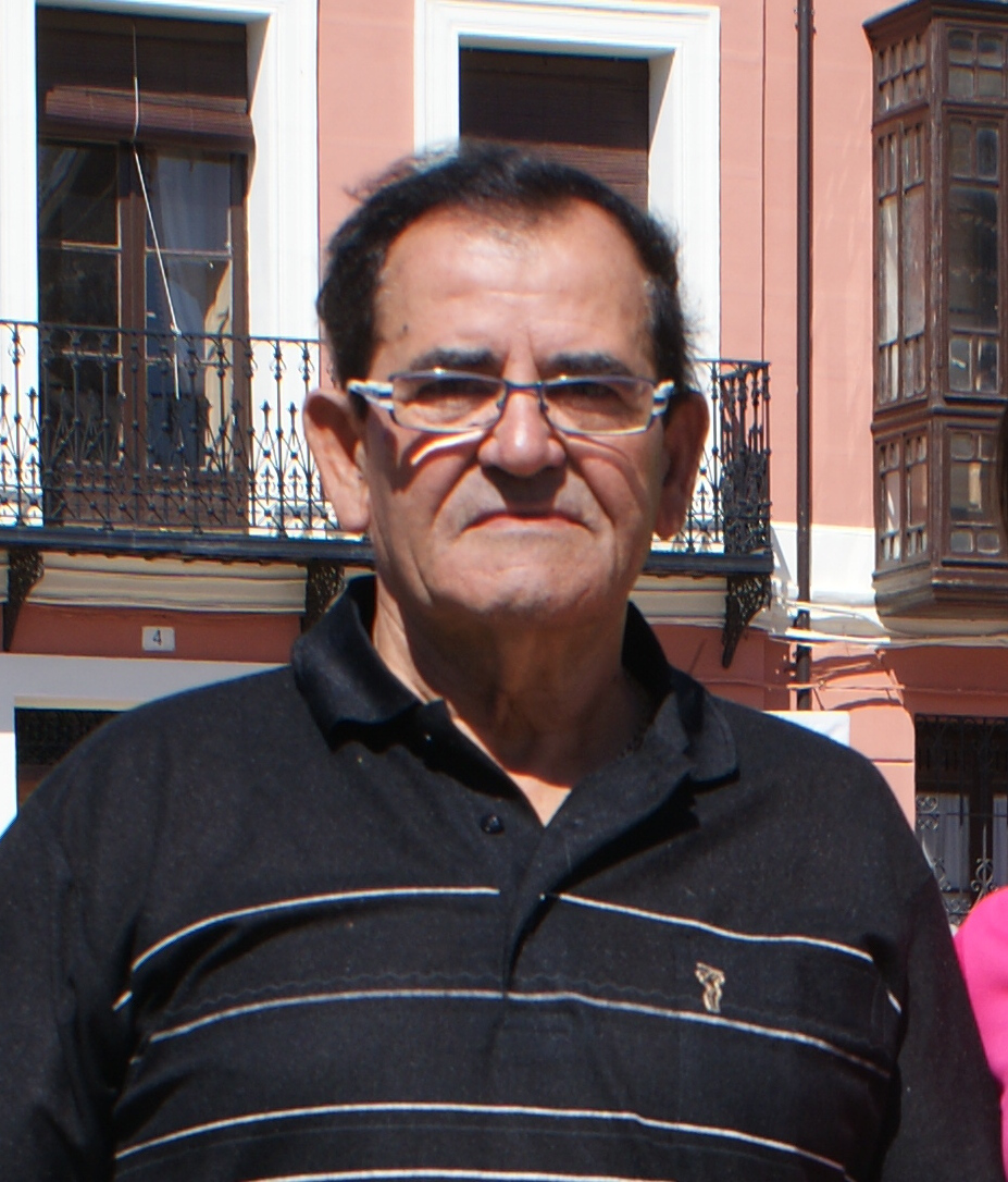 Mariano Haro, atleta español, en 2012 durante una entrega de premios de atletismo en el municipio de Paredes de Nava.